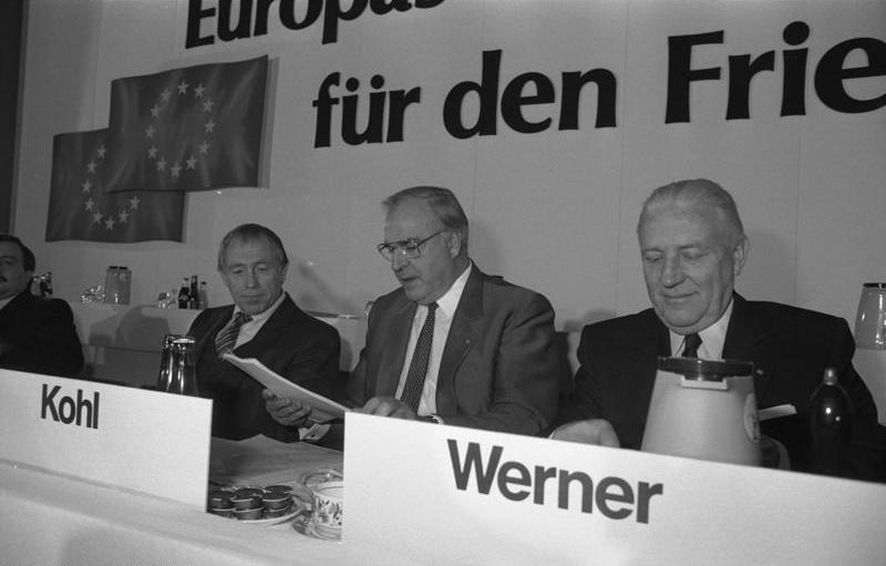 8.11.1983 CDU-Fachkongress über Europäische Sicherheit mit Bundeskanzler Kohl im Konrad-Adenauer-Haus.